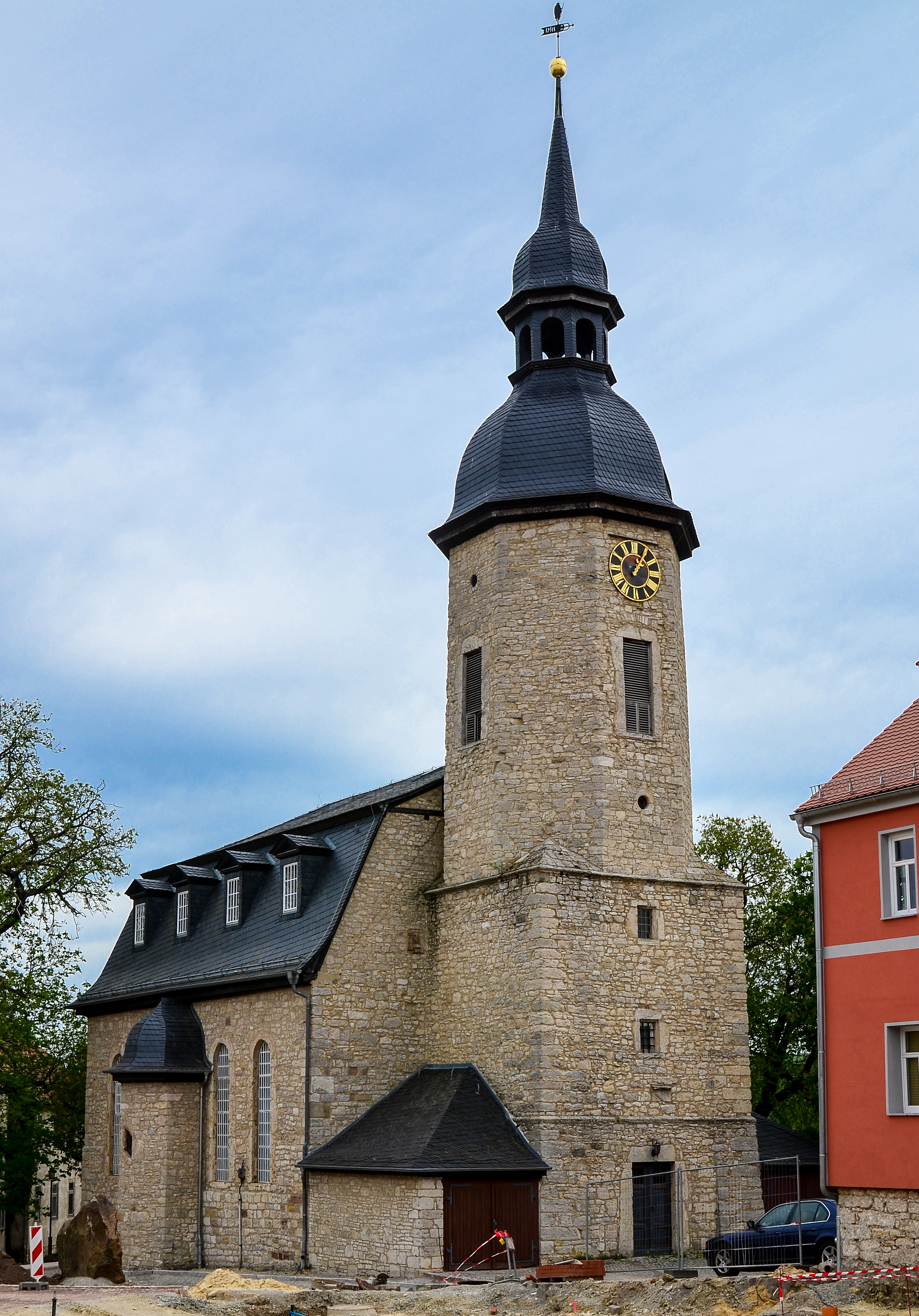 Dornburg Kirche St. Jacobi